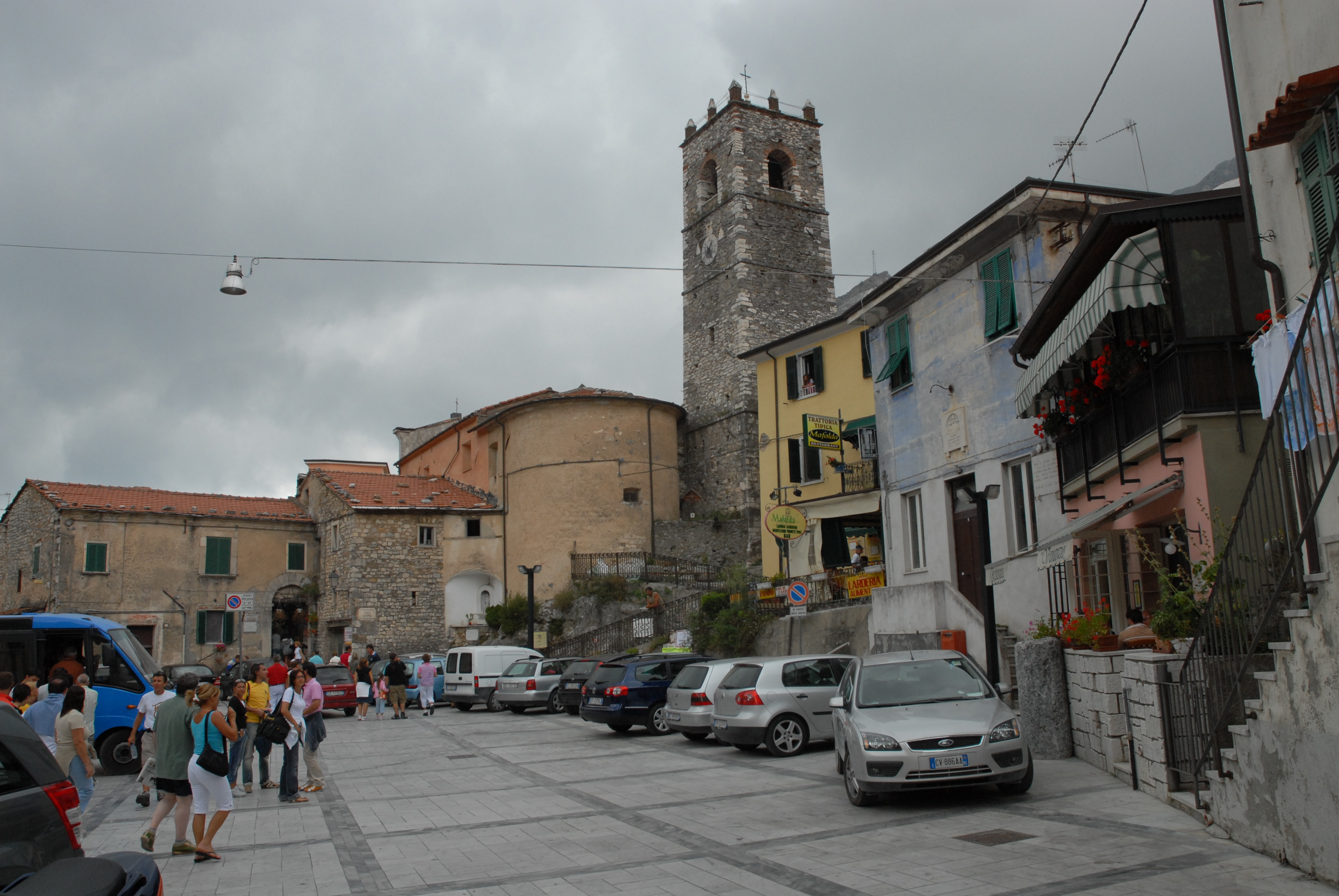 Collonnata, Carrara, Toscana, Italia